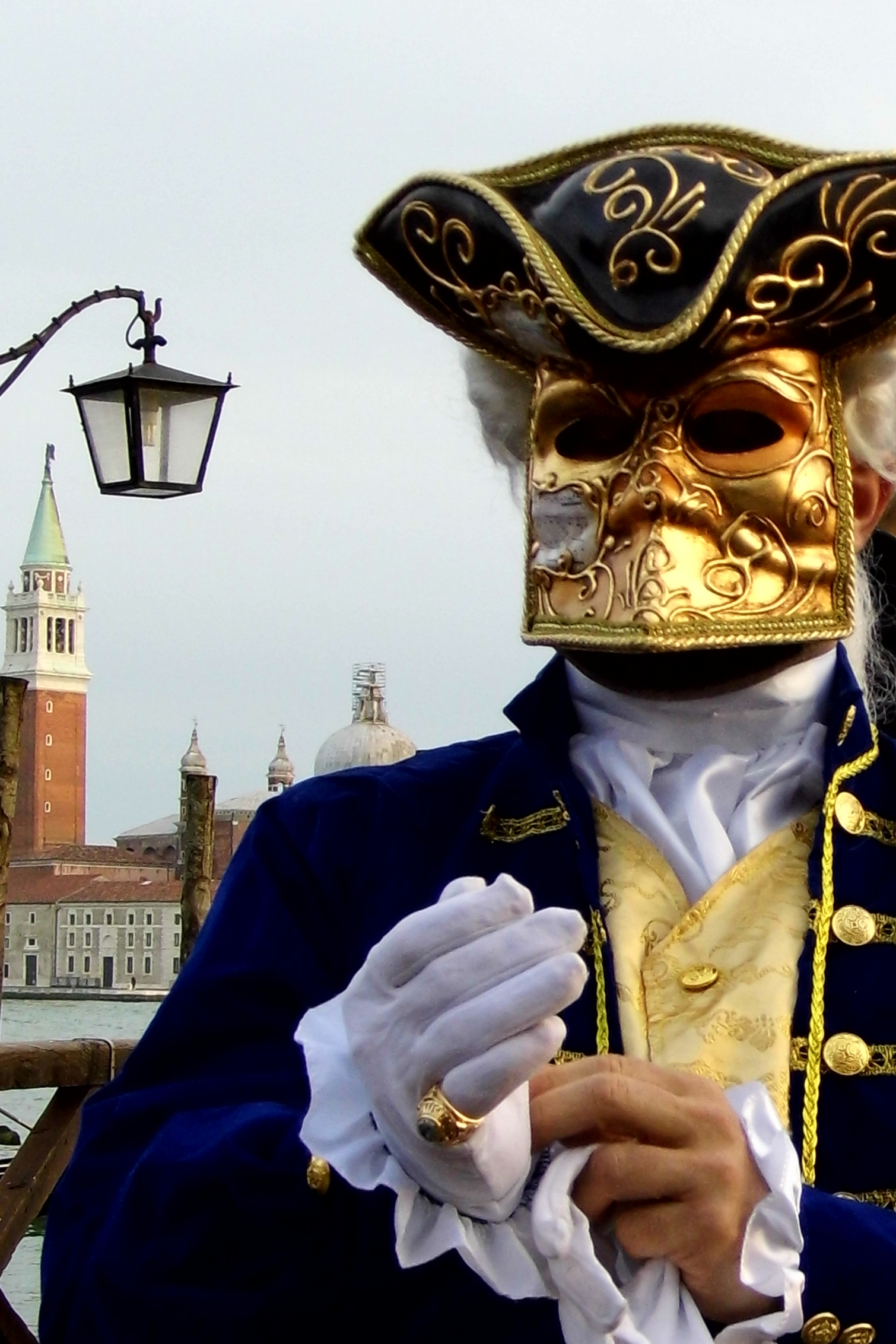 Karneval in Venedig